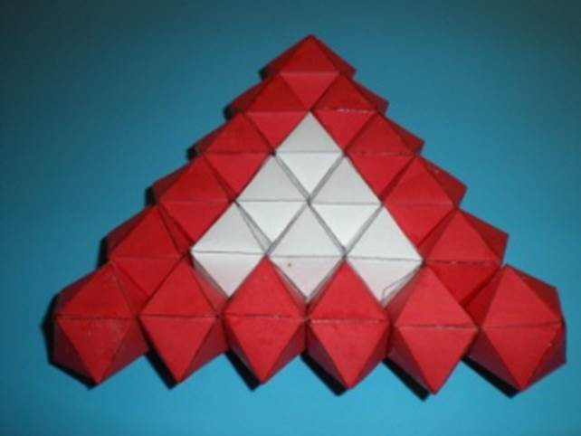 A harmadik ikozaéder egy lapja